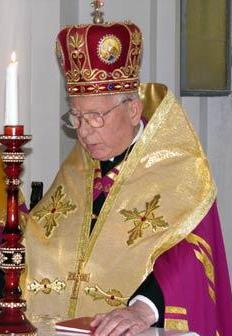 Владика Мирослав Марусин